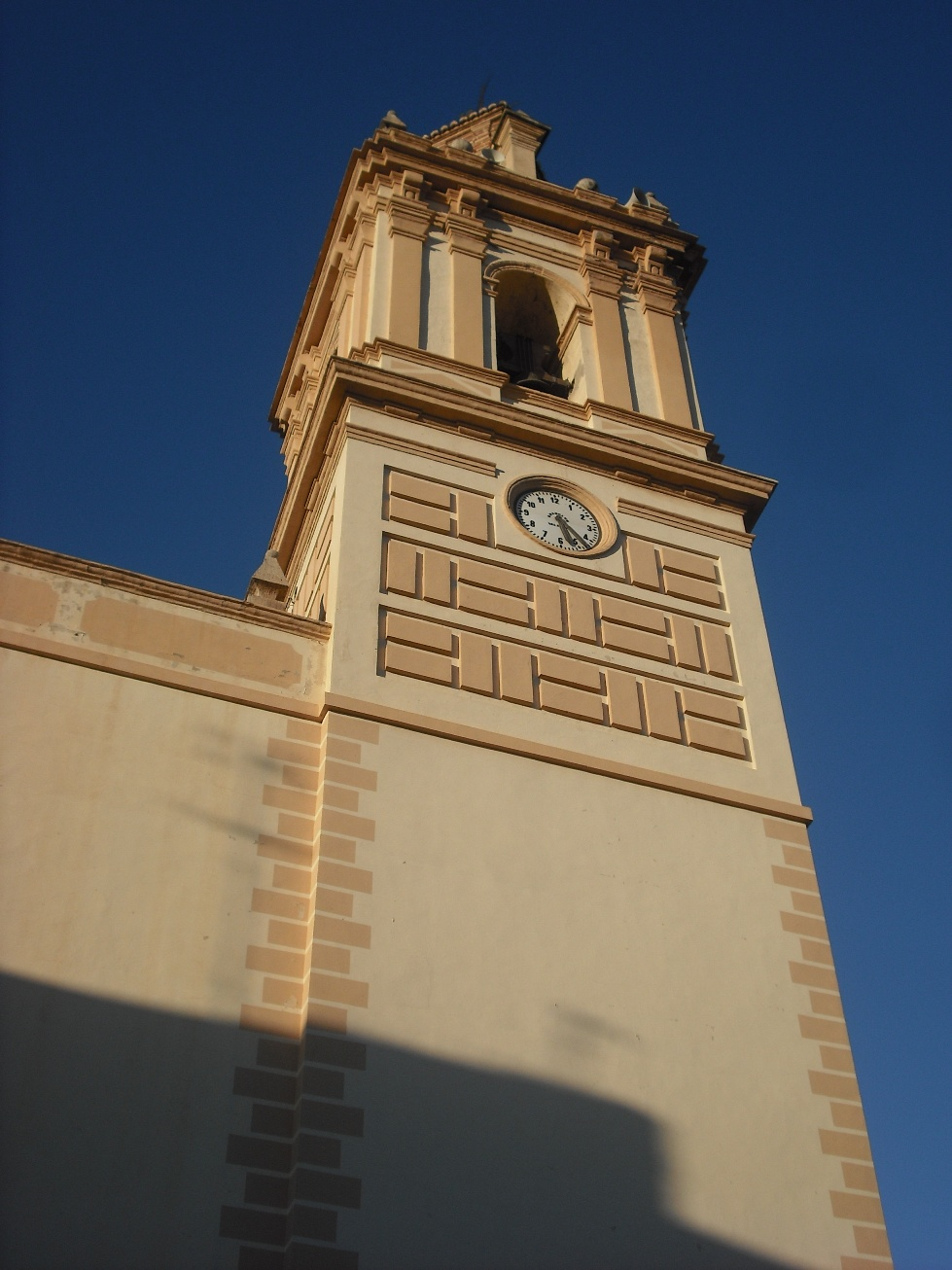 Torre de la Iglesia de Museros.